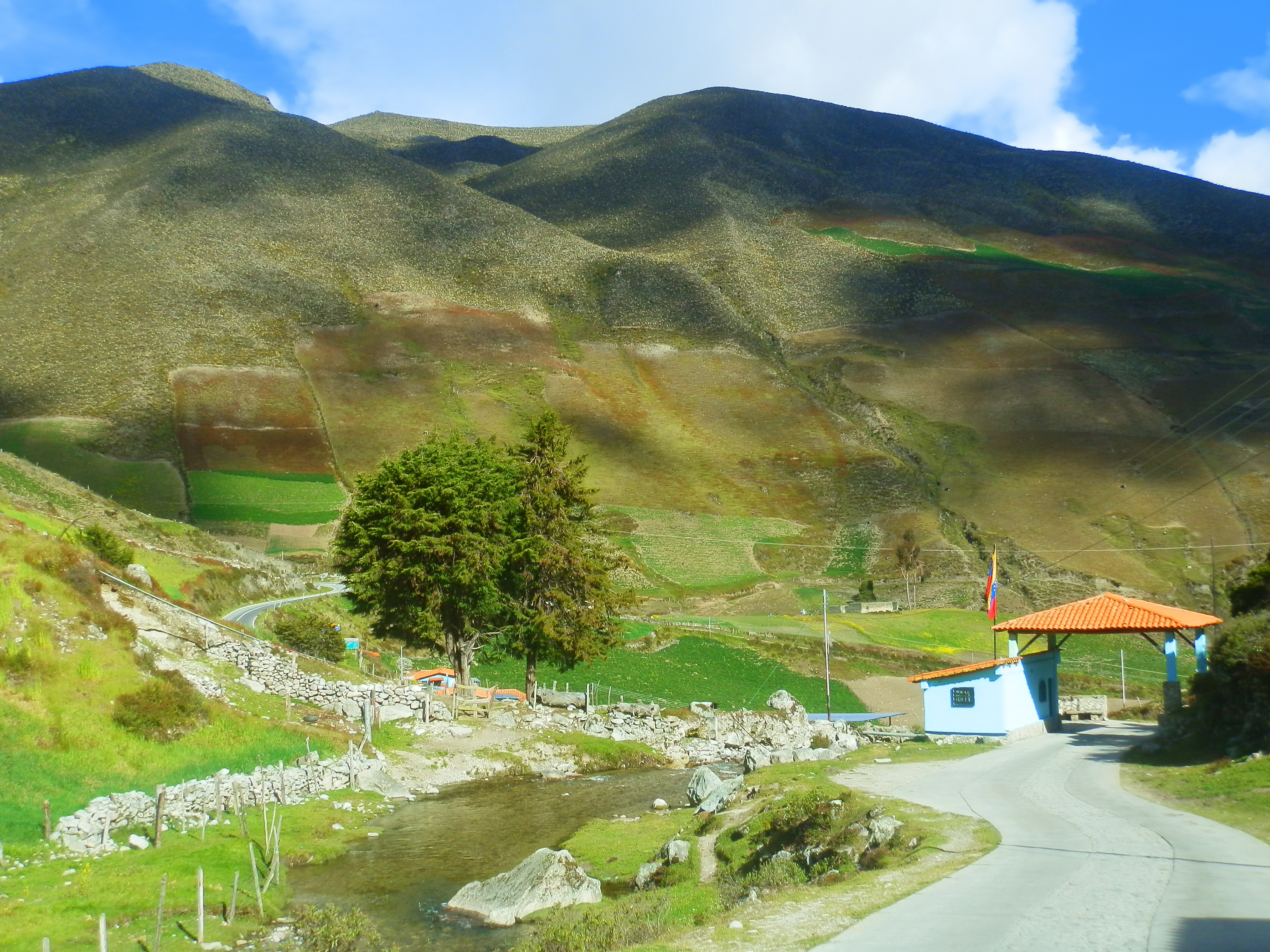 Sierra La Culata, Mérida, Venezuela